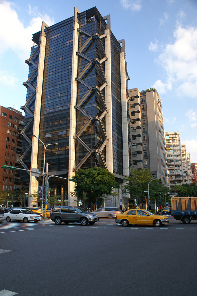 漢德民生大樓，漢德建設投資興建，大陸工程建造，為大陸工程1999至2004年企業總部。